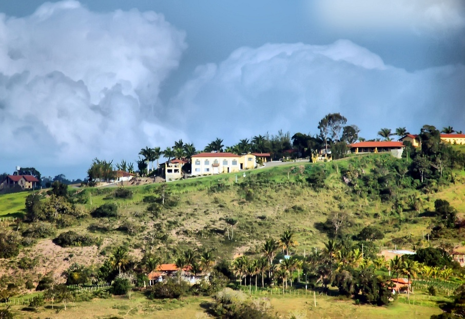 Gravatá, Pernambuco - Brasil.